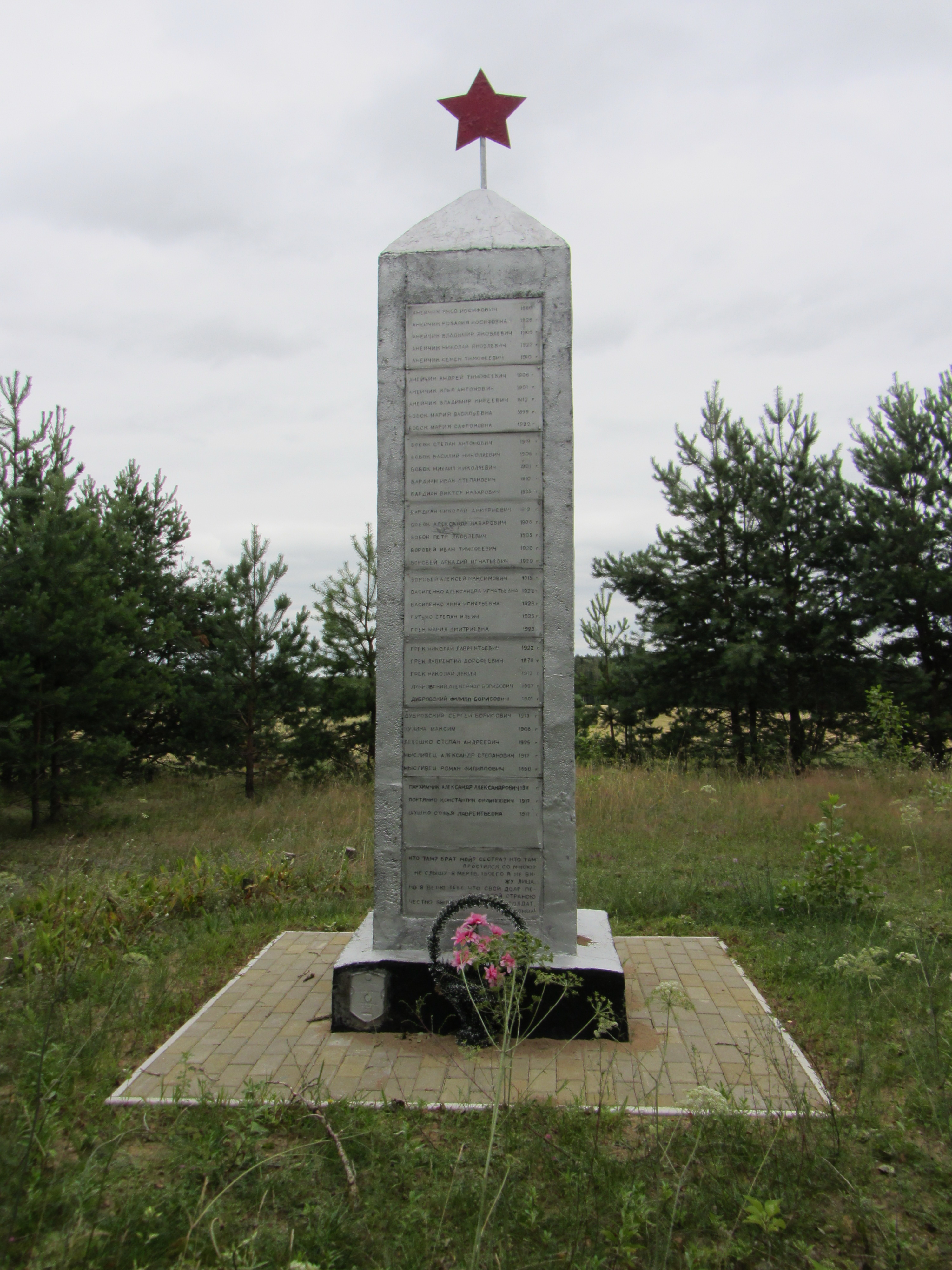 Вёска Церабель, Пухавіцкі раён. Помнік землякам.